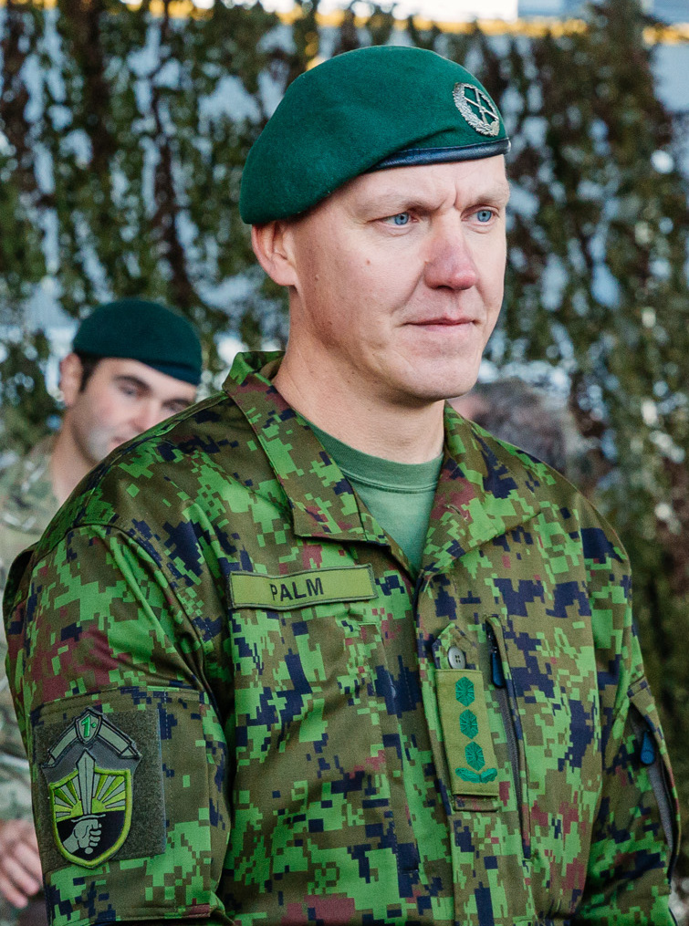 Kol Veiko-Vello Palm, 1. jalaväebrigaadi ülem